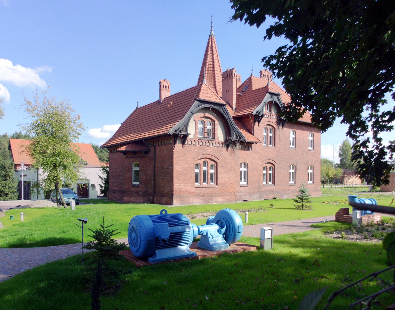 zespół budynków stacji wodociągów „Las Gdański”, 1900: stacja pomp studnia zbiorcza budynek galogeneratorów dom mieszkalny ogrodzenie Bydgoszcz, ul. Gdańska 242